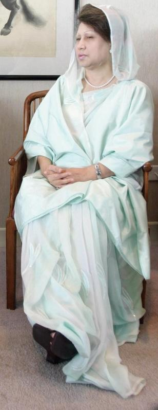 A primeira-ministra da República Popular de Bangladesh, Begum Khaleda Zia. (foto:Antônio Milena)